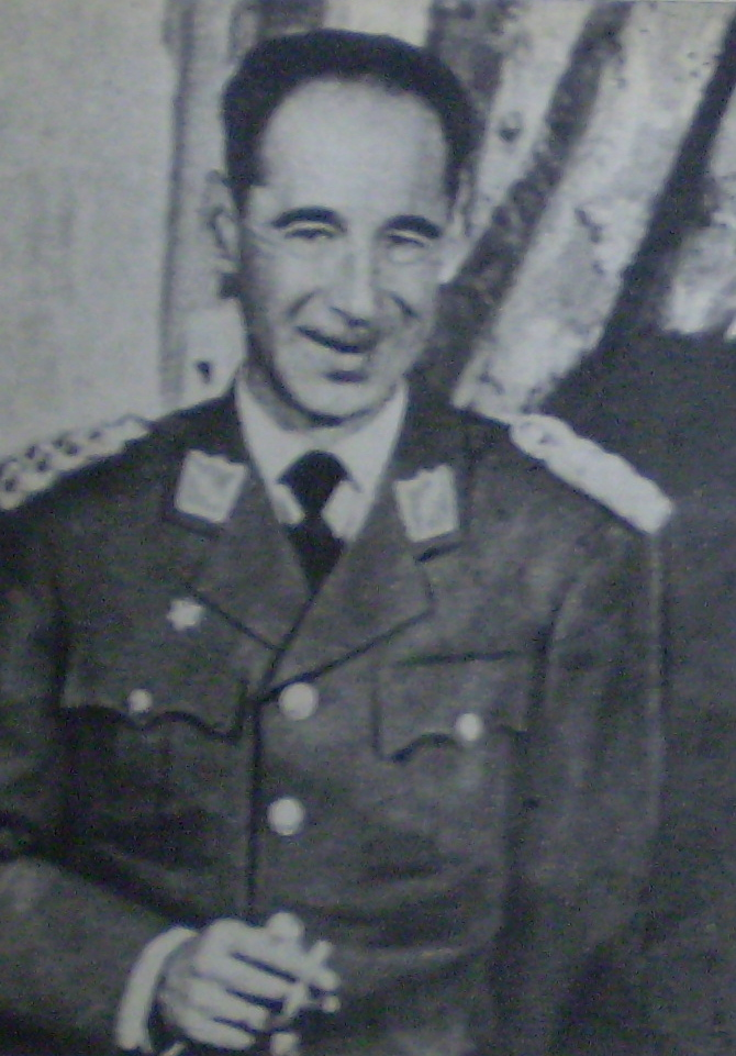 Alfredo Ovando. Presidente de facto de Bolivia